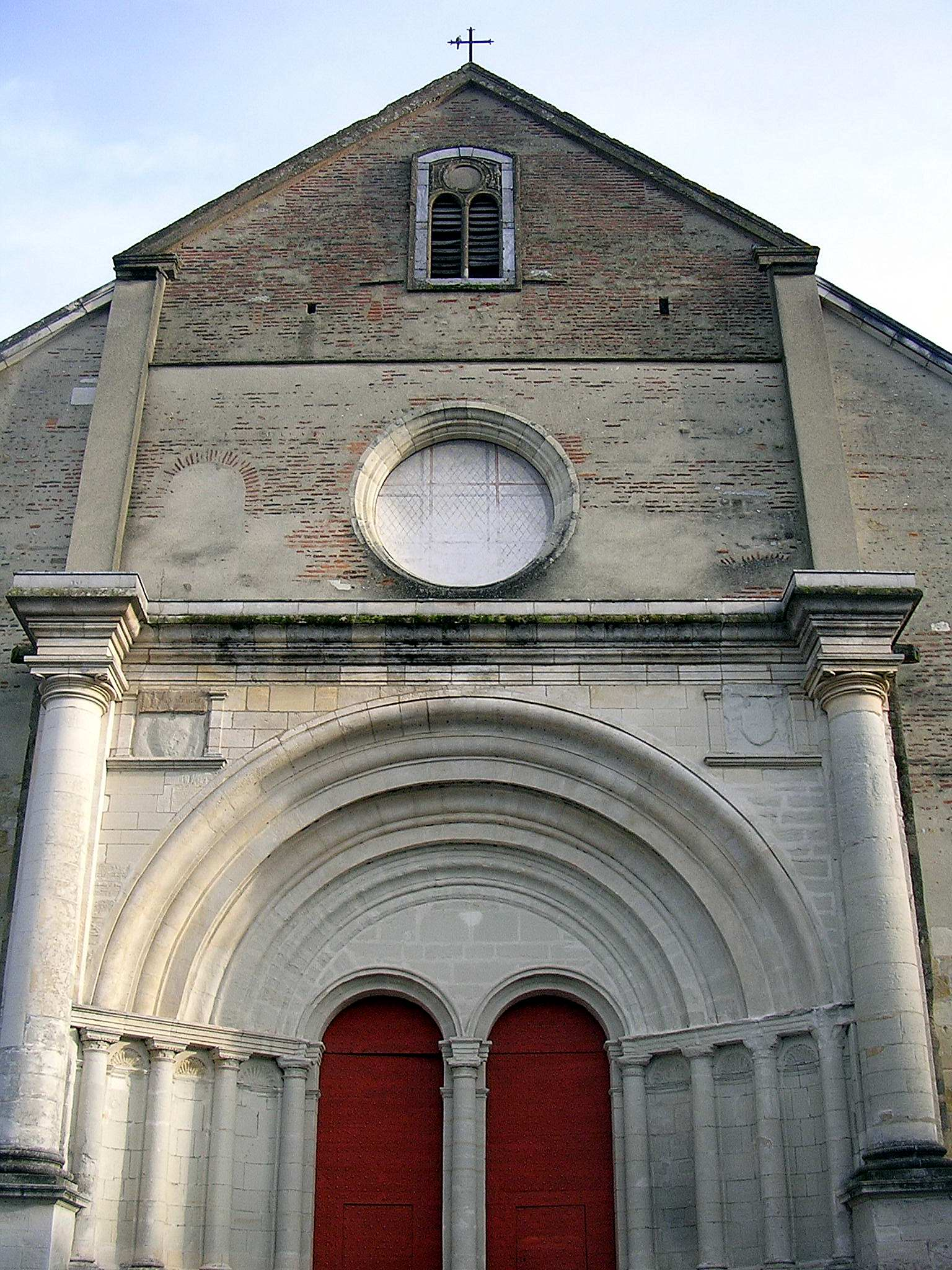 Cathédrale de Lescar